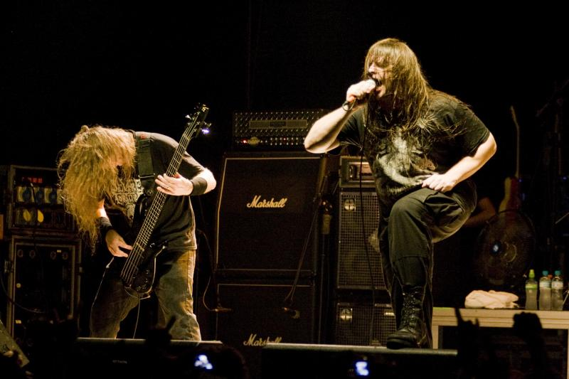 Alex Webster and George Fisher of Cannibal Corpse Live @ Santana Hall - 21/02/2010 - São Paulo, Brasil É proibida a cópia ou reprodução deste material sem a autorização do autor. Por favor, não publique nada daqui sem o devido crédito. Fotógrafo: Alexandre Cardoso